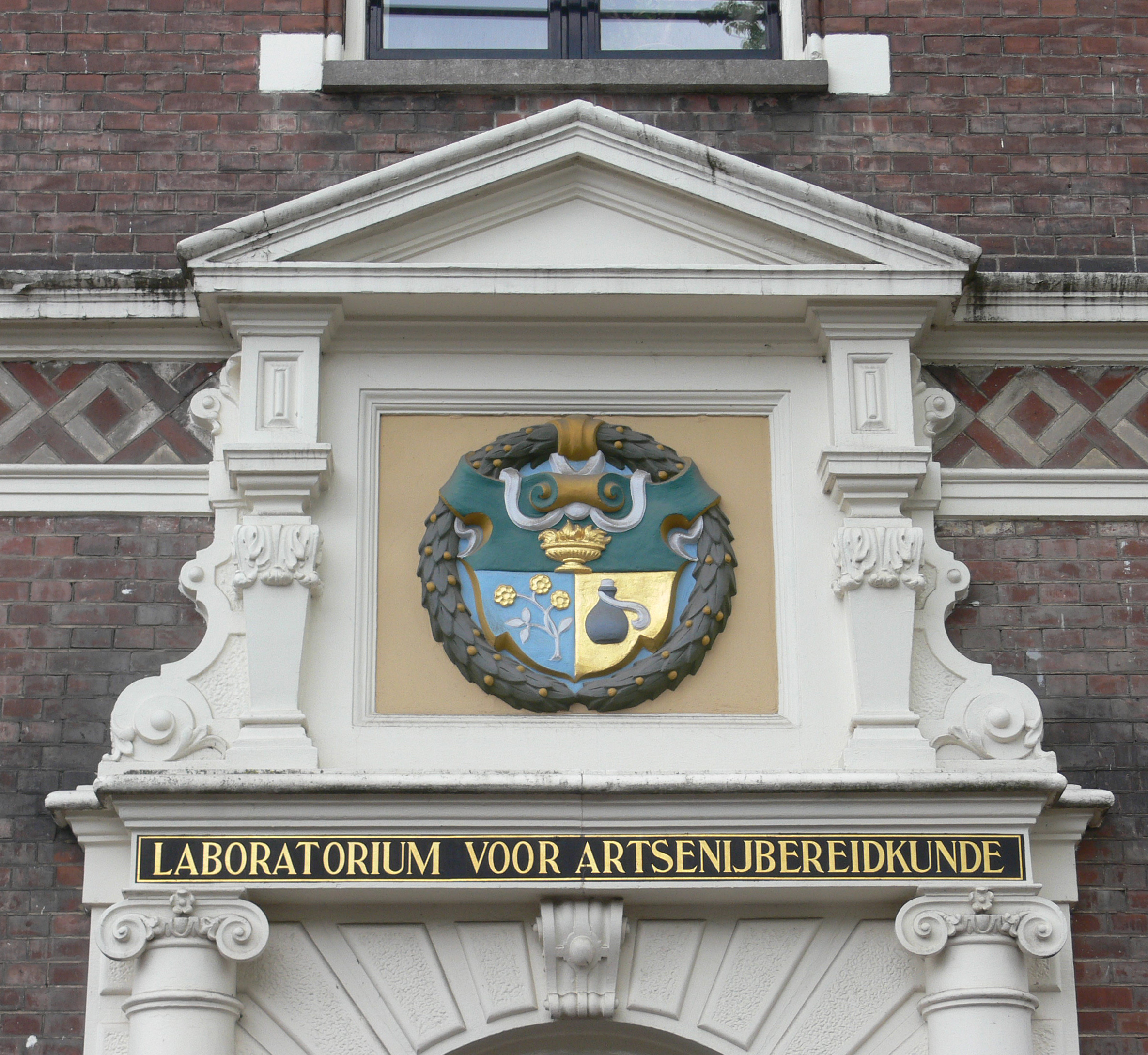 Amsterdam - Klovenierburgwal - Laboratorium voor artsenijbereidkunde 9″ N, 4° 53′ 46.21″ E